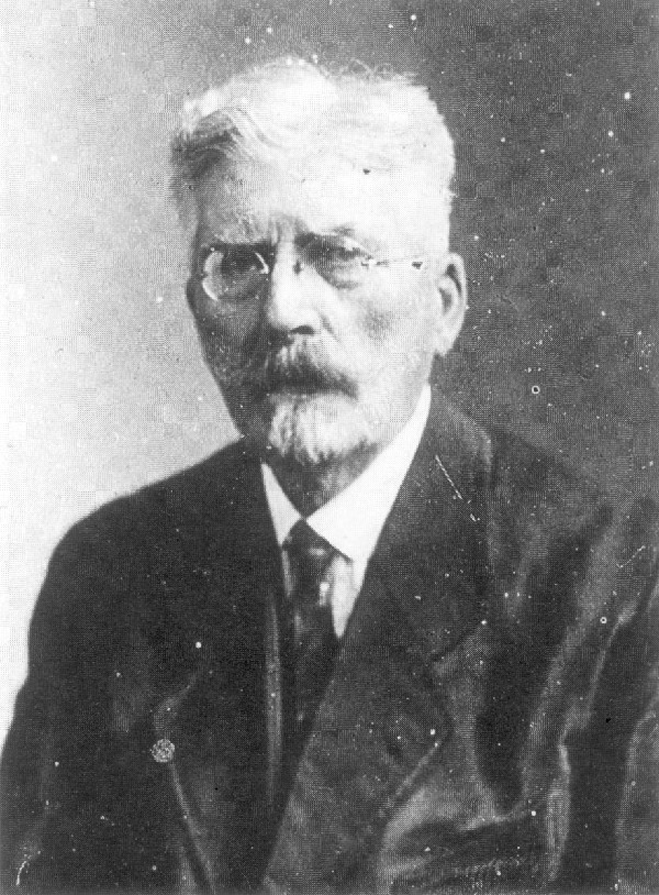 Zelfportret van Joseph Gindra